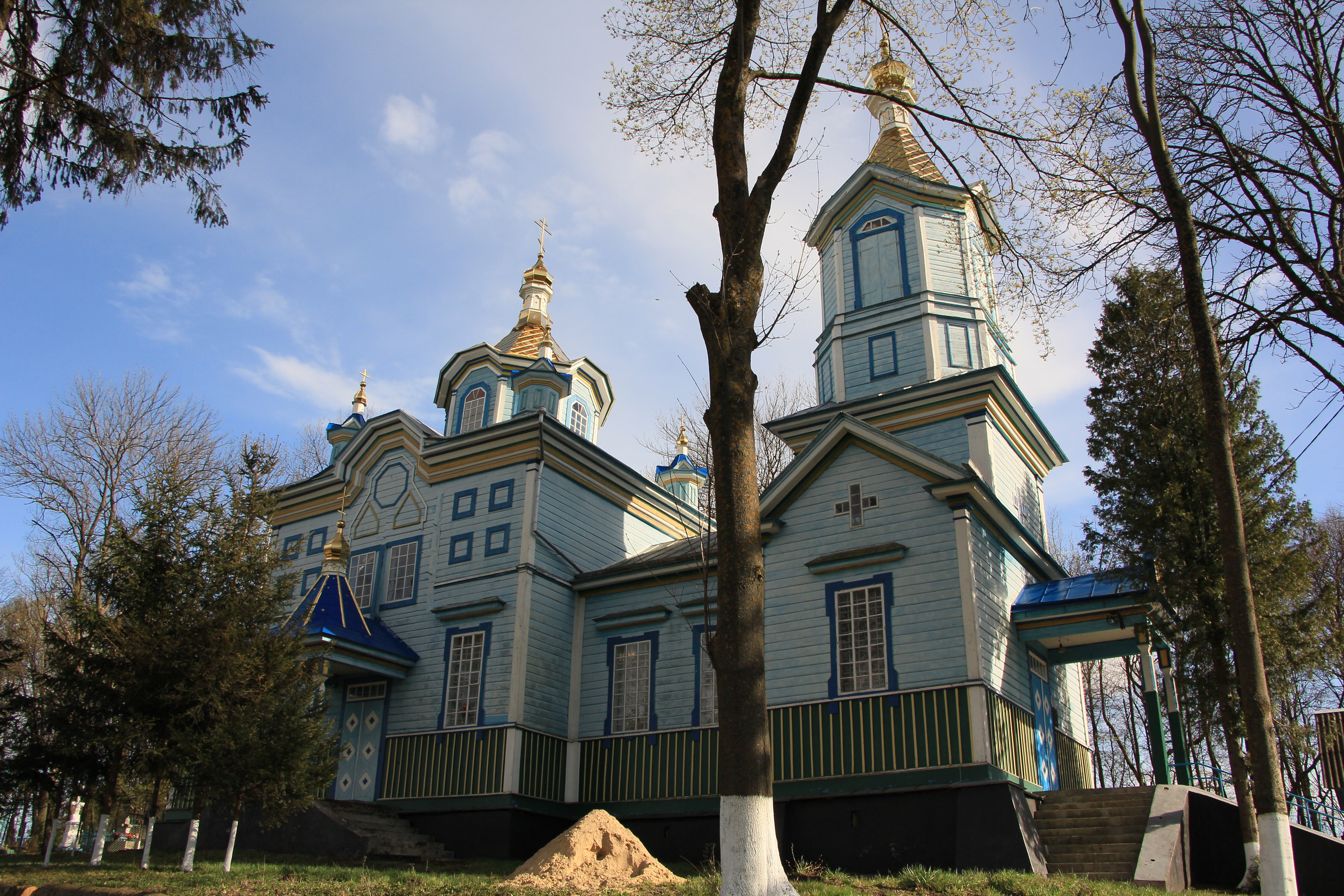 Дерев'яна церква в селі Очеретне Кременецького району Тернопільської області